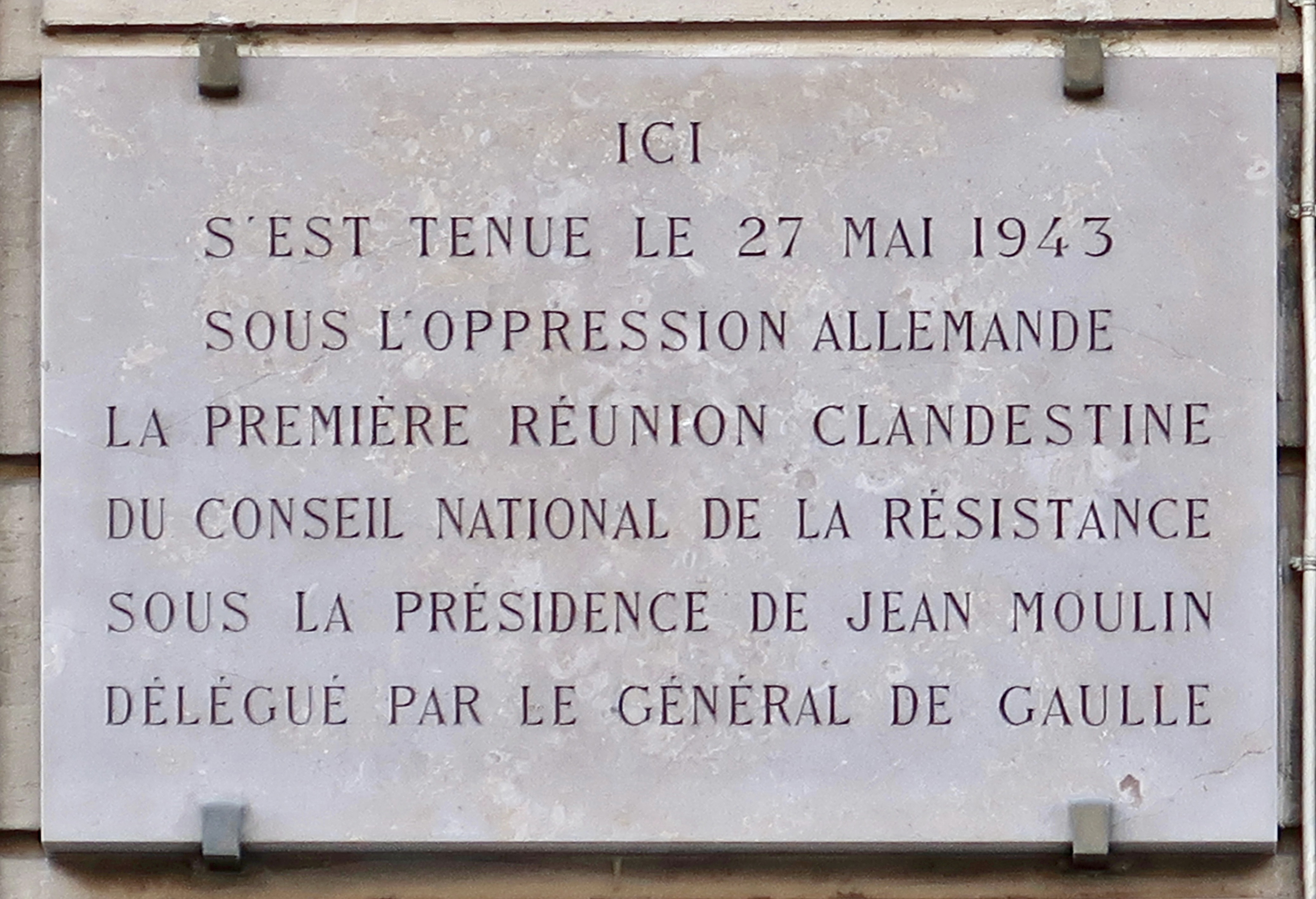 Plaque en hommage au Conseil national de la Résistance, 48 rue du Four (Paris, 6e).